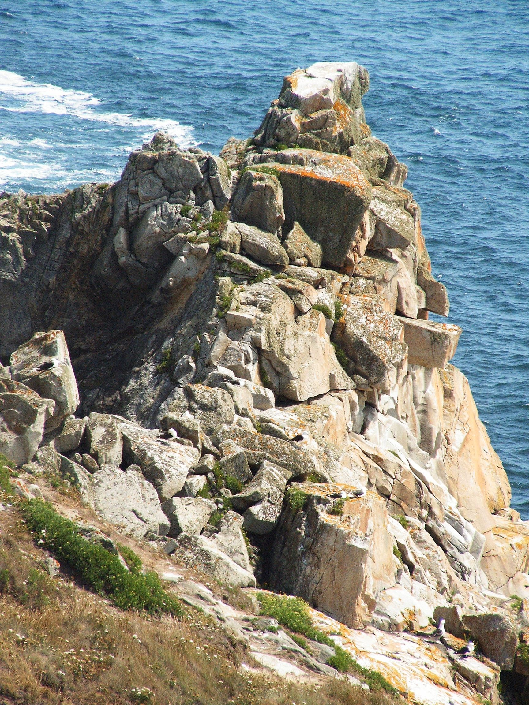 Felsformationen am Pointe du Raz in der Bretagne